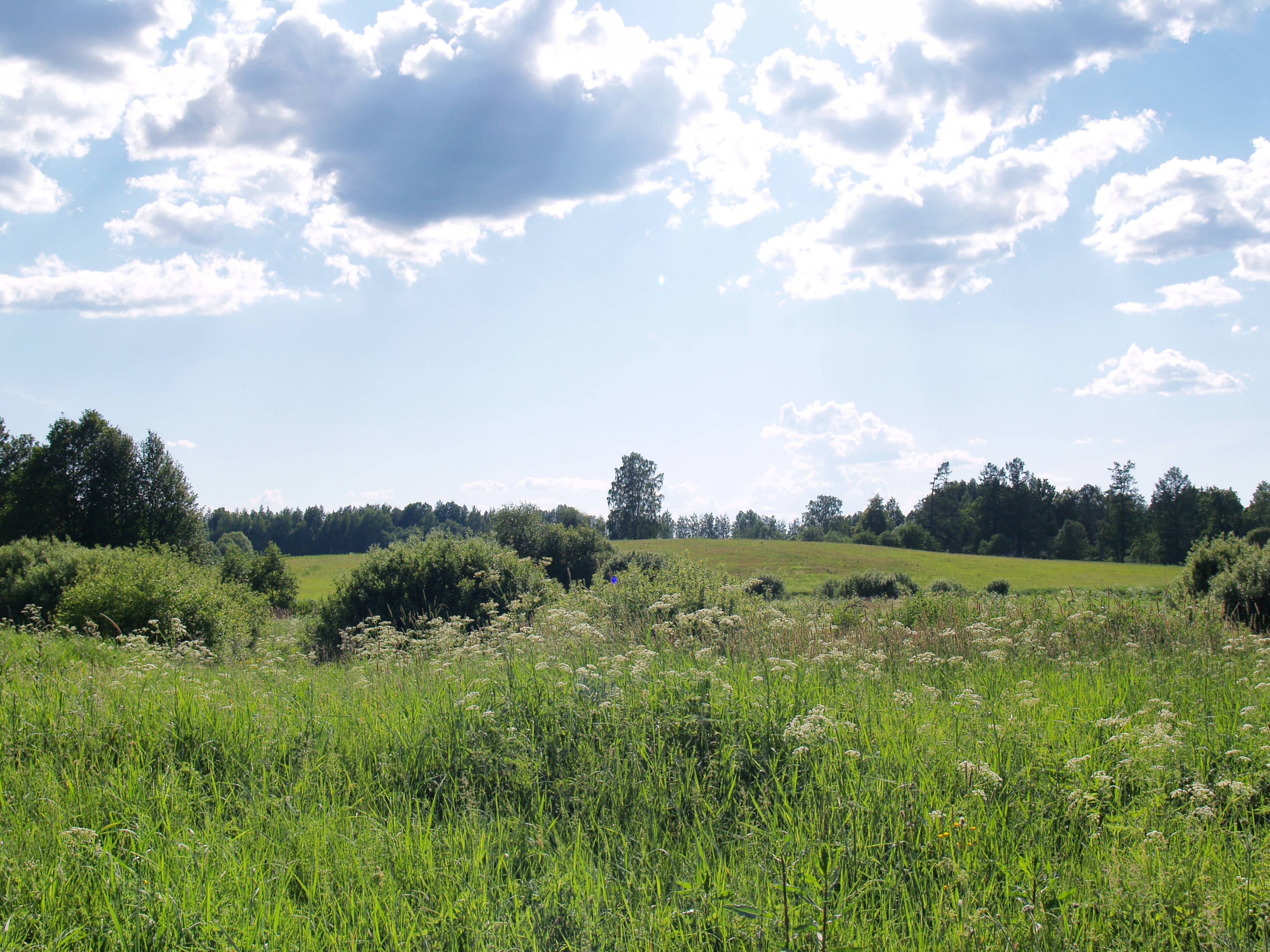 Ziemeļvidzeme (North-Vidzeme)